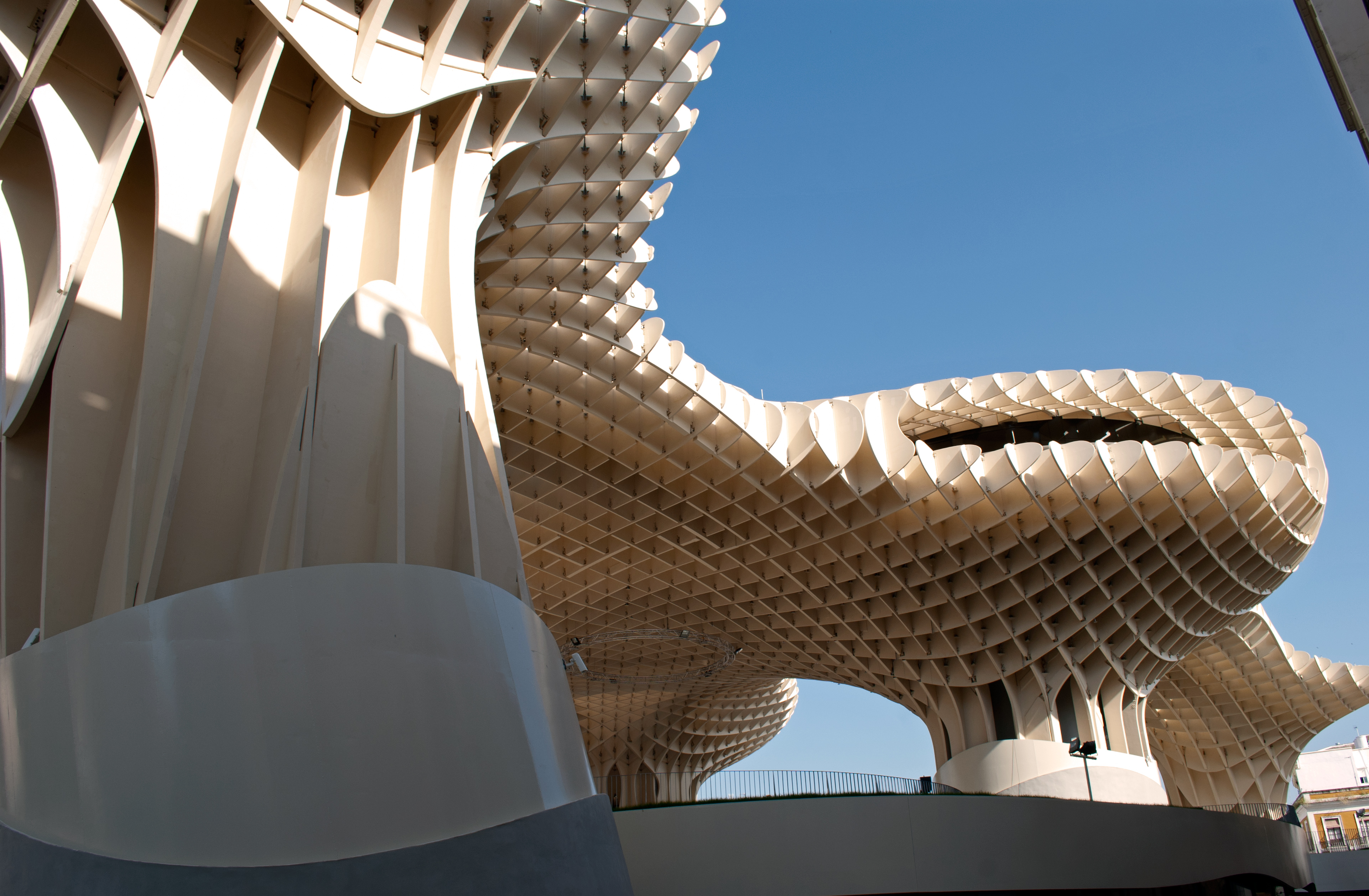 Metropol Parasol, plaza de la Encarnación (Sevilla).